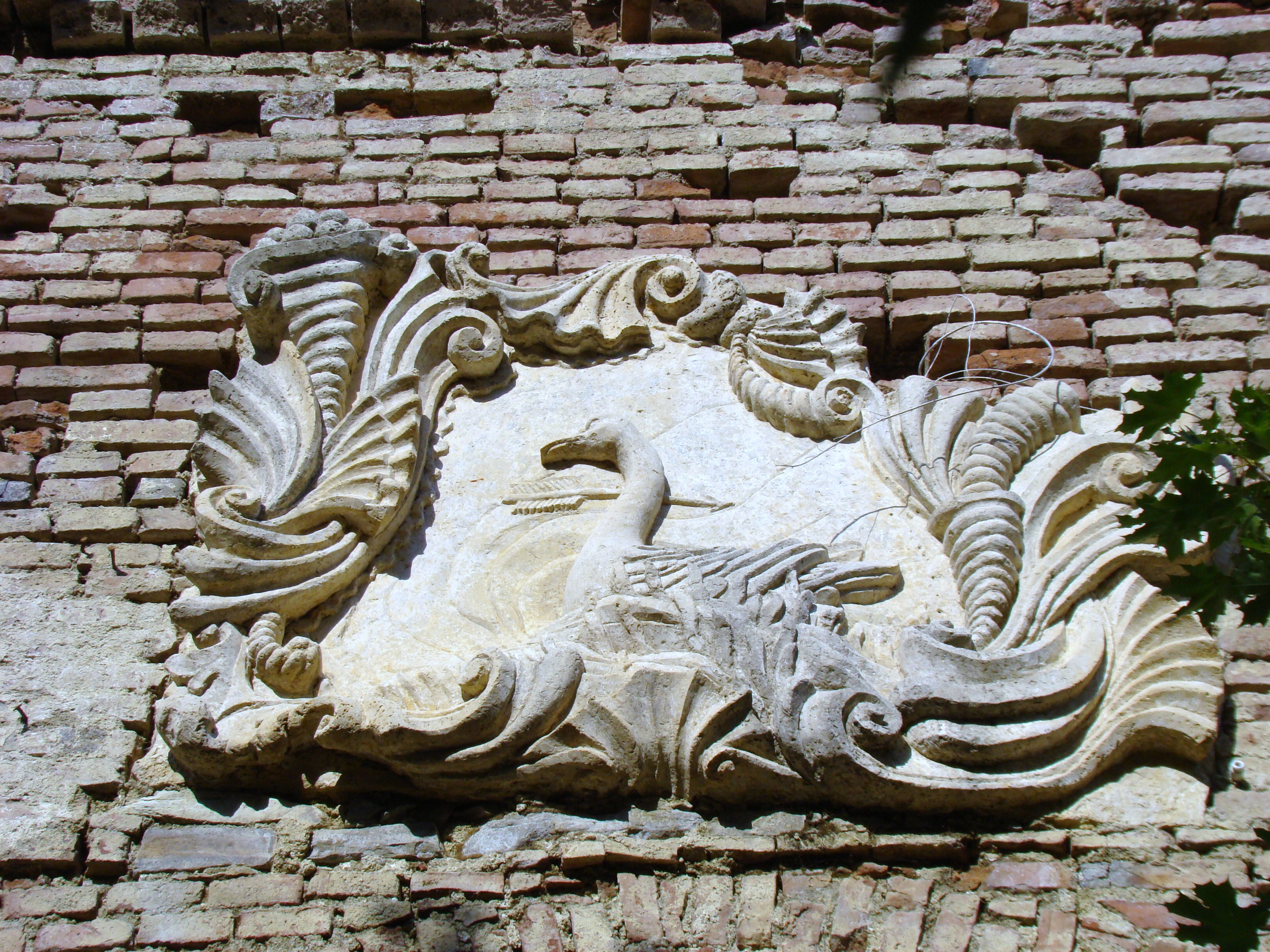 Castelul Teleki, sat COMLOD; comuna MILAŞ